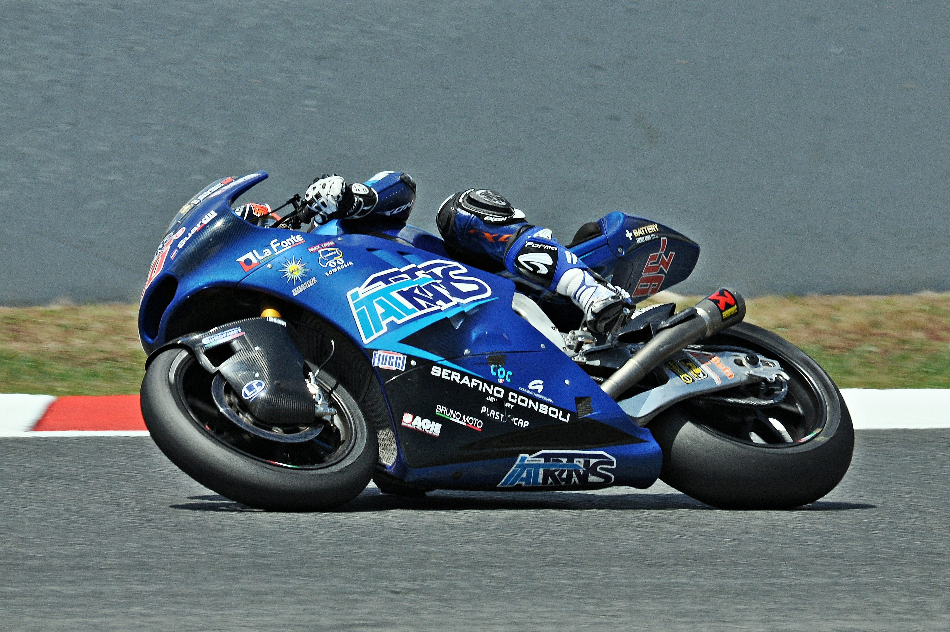 gran premio de cataluña